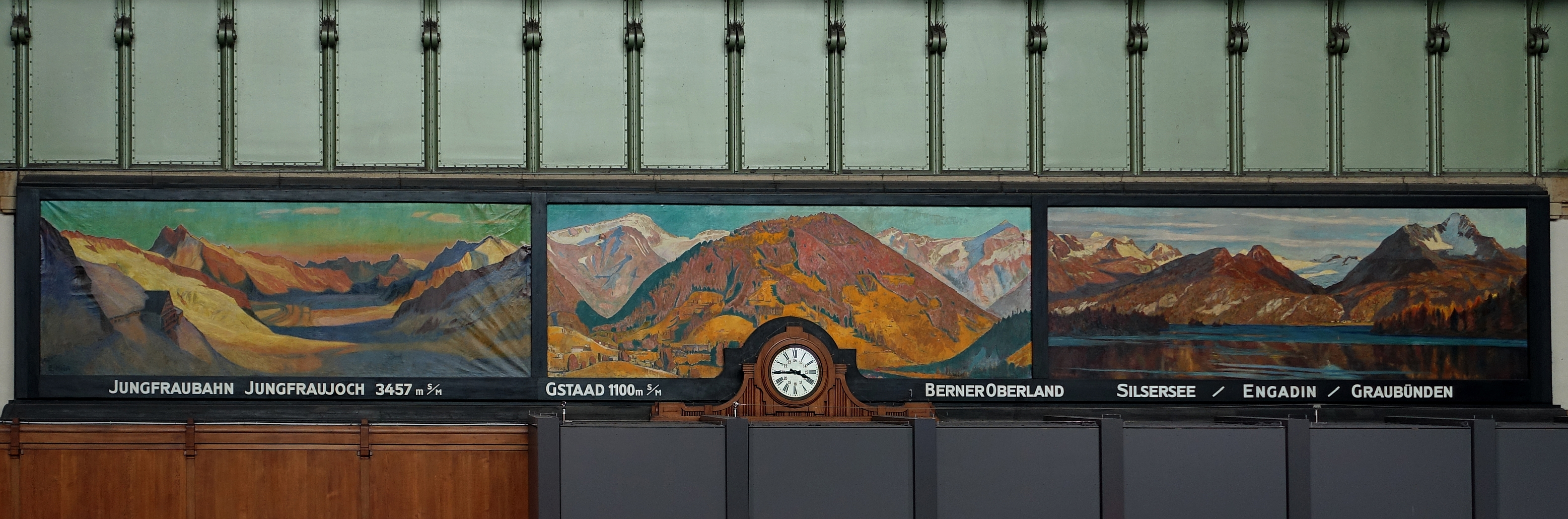 Ernst Hodel junior (1881–1955), Dreiteiliges Wandbild von 1927 zeigt Jungfraubahn-Jungfraujoch, Gstaad-Berner Oberland, Silsersee-Engadin-Graubünden. Einteiliges Panorama Wandbild von Vierwaldstättersee. Das Panorama Bild zählt mit seiner Fläche von 5 mal 15 Metern zu den grössten Wandgemälden der Schweiz. Sie wurden 2015 denkmalpflegegerecht restauriert und sind in der Basler SBB Bahnhofshalle zu sehen.